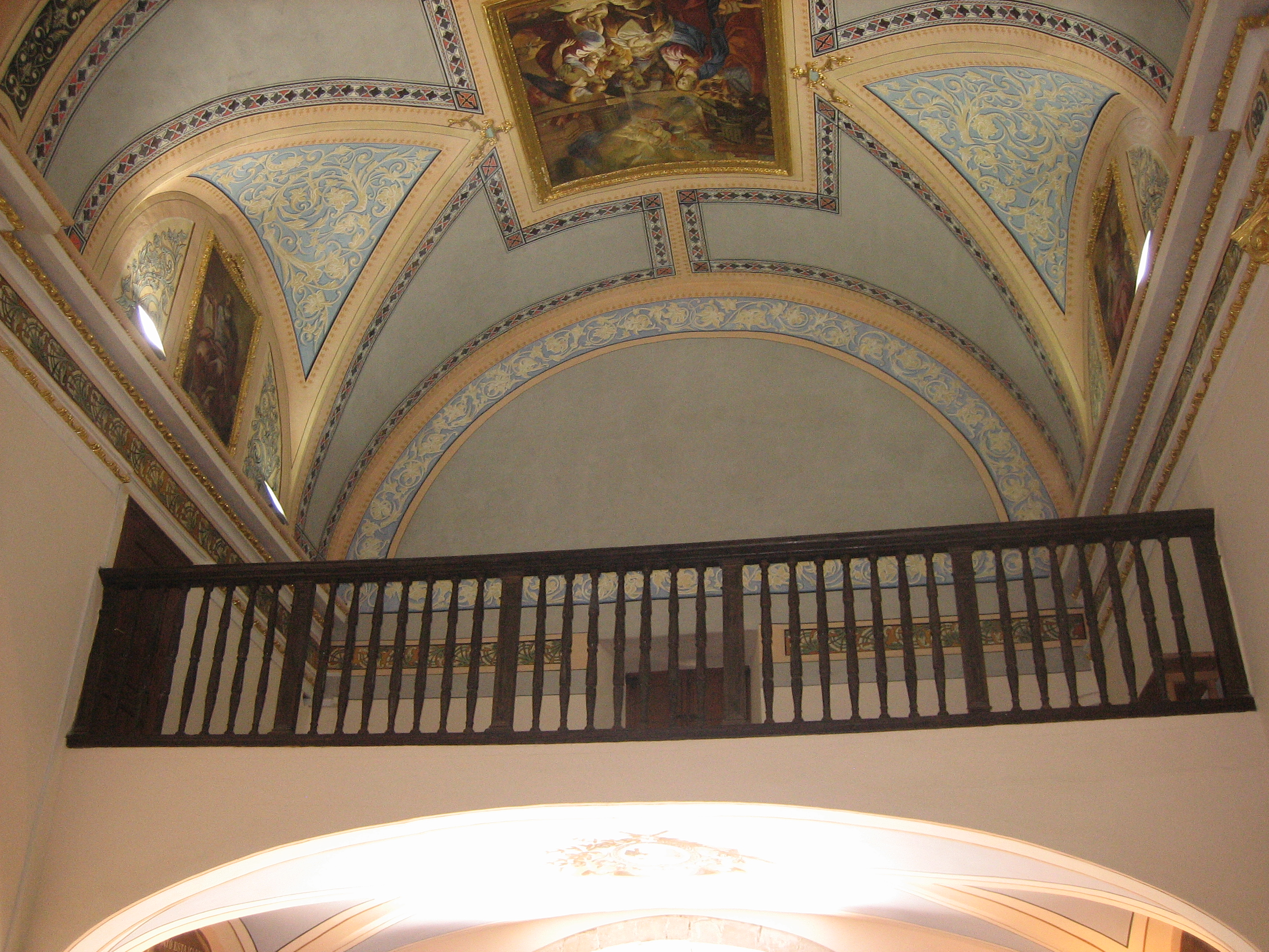 Cor de l'ermita de la Mare de Déu de la Misericòrdia i Sant Sebastià de Vinaròs (Baix Maestrat)